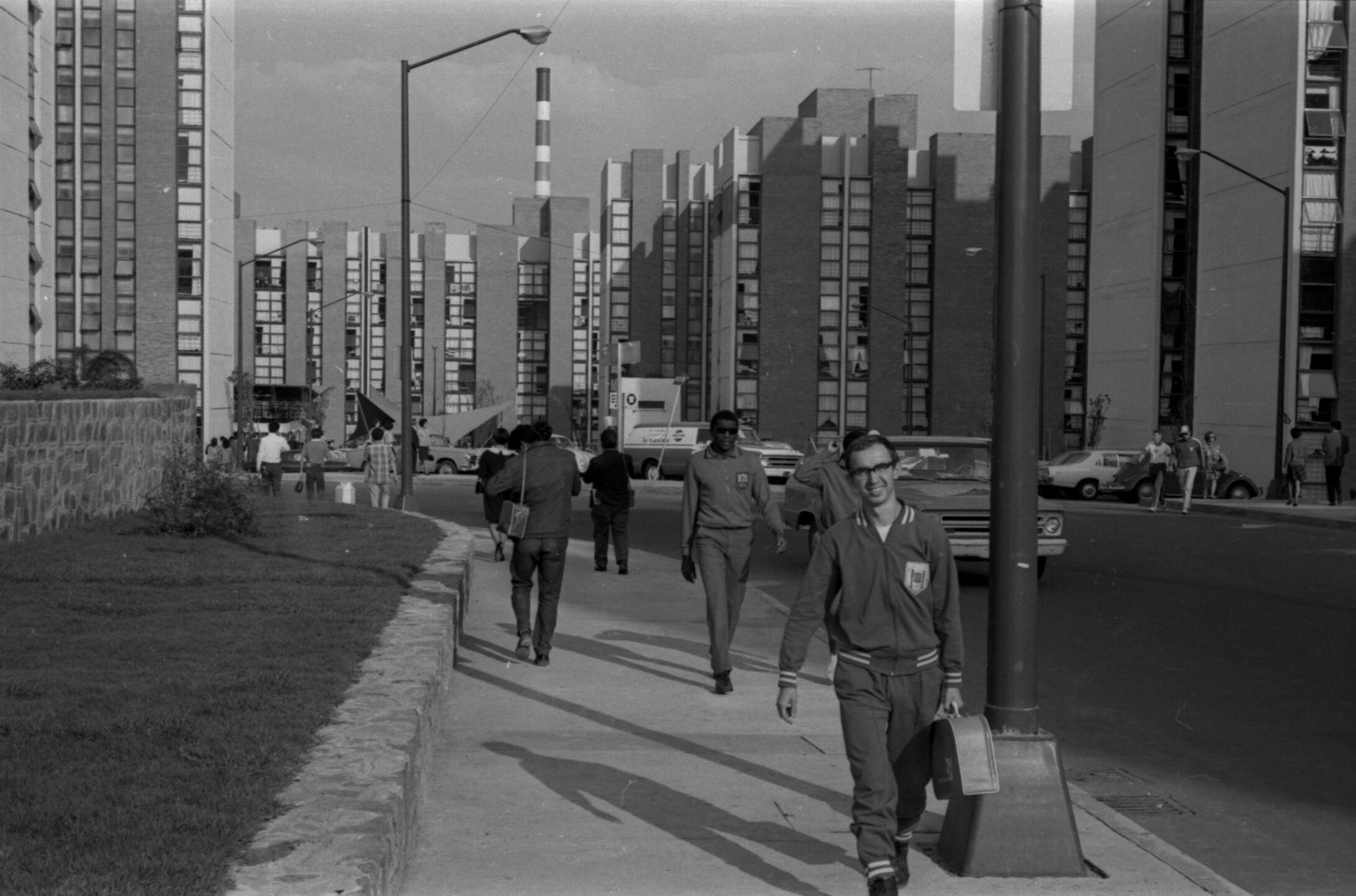 Fotografía antigua de la Ciudad de México resguardadas por el Museo Archivo de la Fotografía (MAF) de la Ciudad de México.